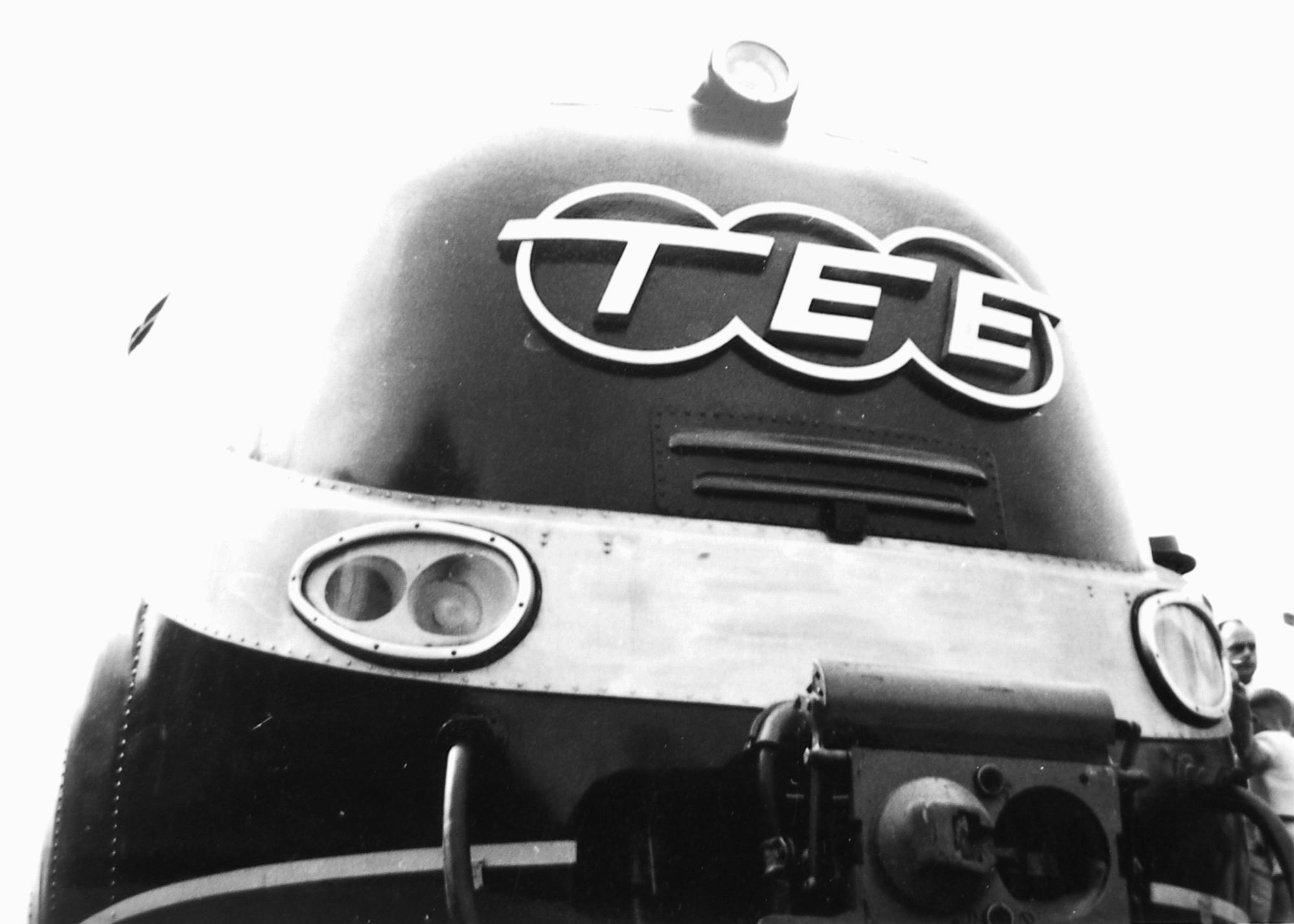 Dieseltriebwagen der Baureihe VT 11.5 der Deutschen Bundesbahn.